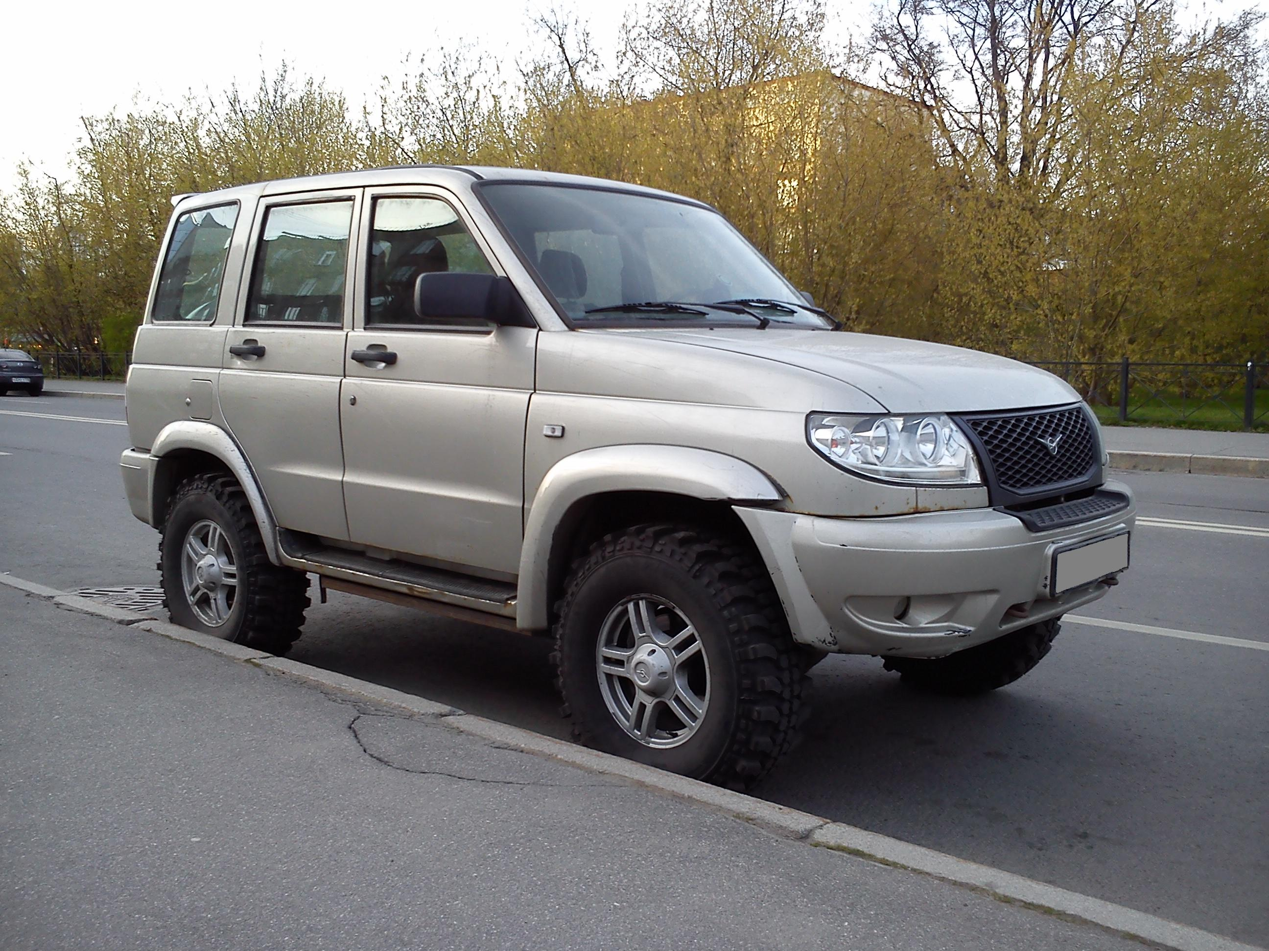 UAZ Patriot Sport (УАЗ-3164) — короткобазная версия внедорожника UAZ Patriot